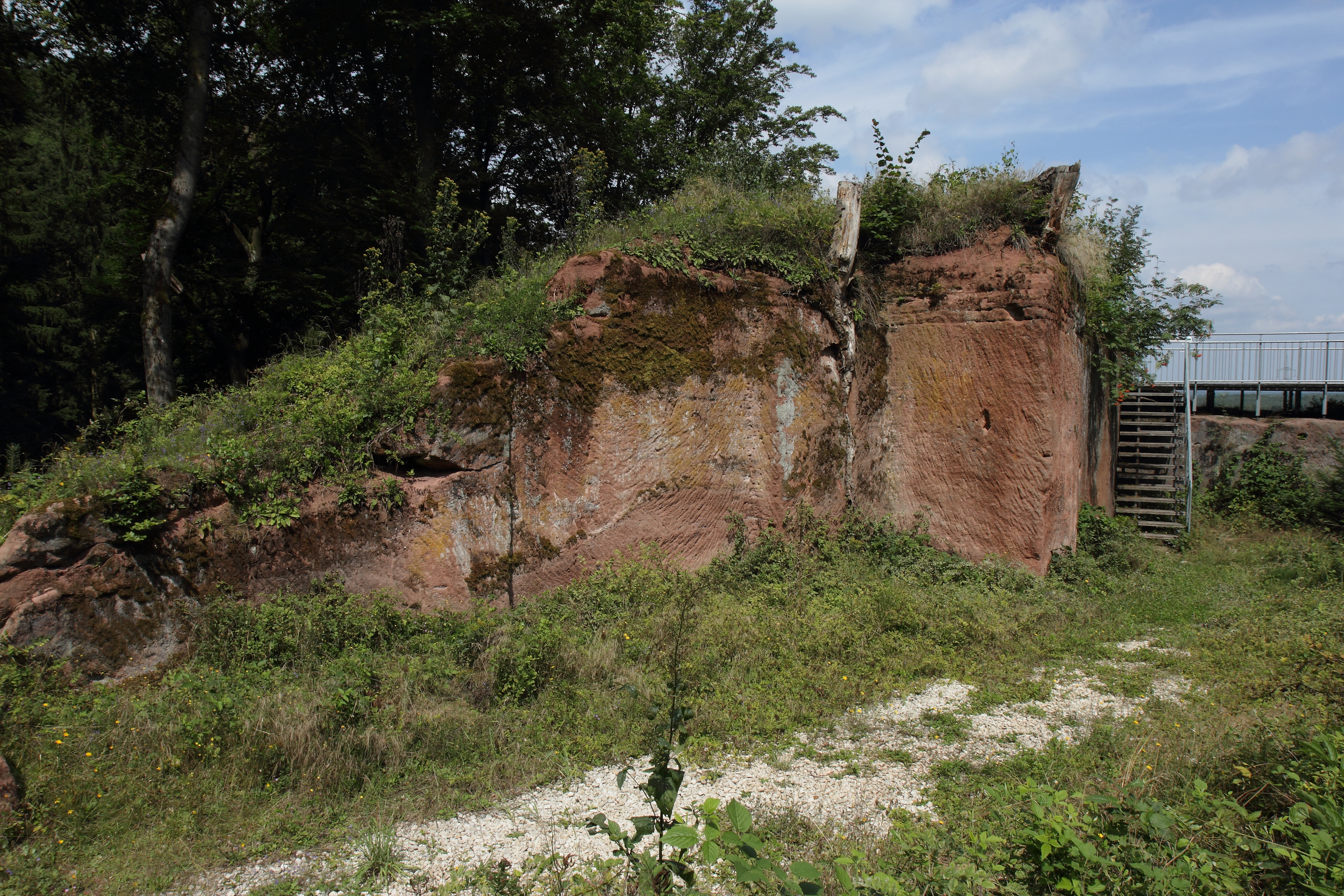 Burgstall Altenheideck - Ansicht des durch einen Steinbruch zum größten Teil zerstörten Burghügel